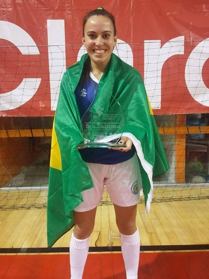 Atleta da Seleção Brasileira de Futebol de Salão da CNFS - Confederação Nacional de Futebol de Salão.